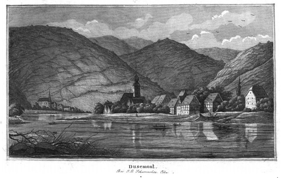 Dusemont (heute Brauneberg) an der Mosel. Stahlstich.